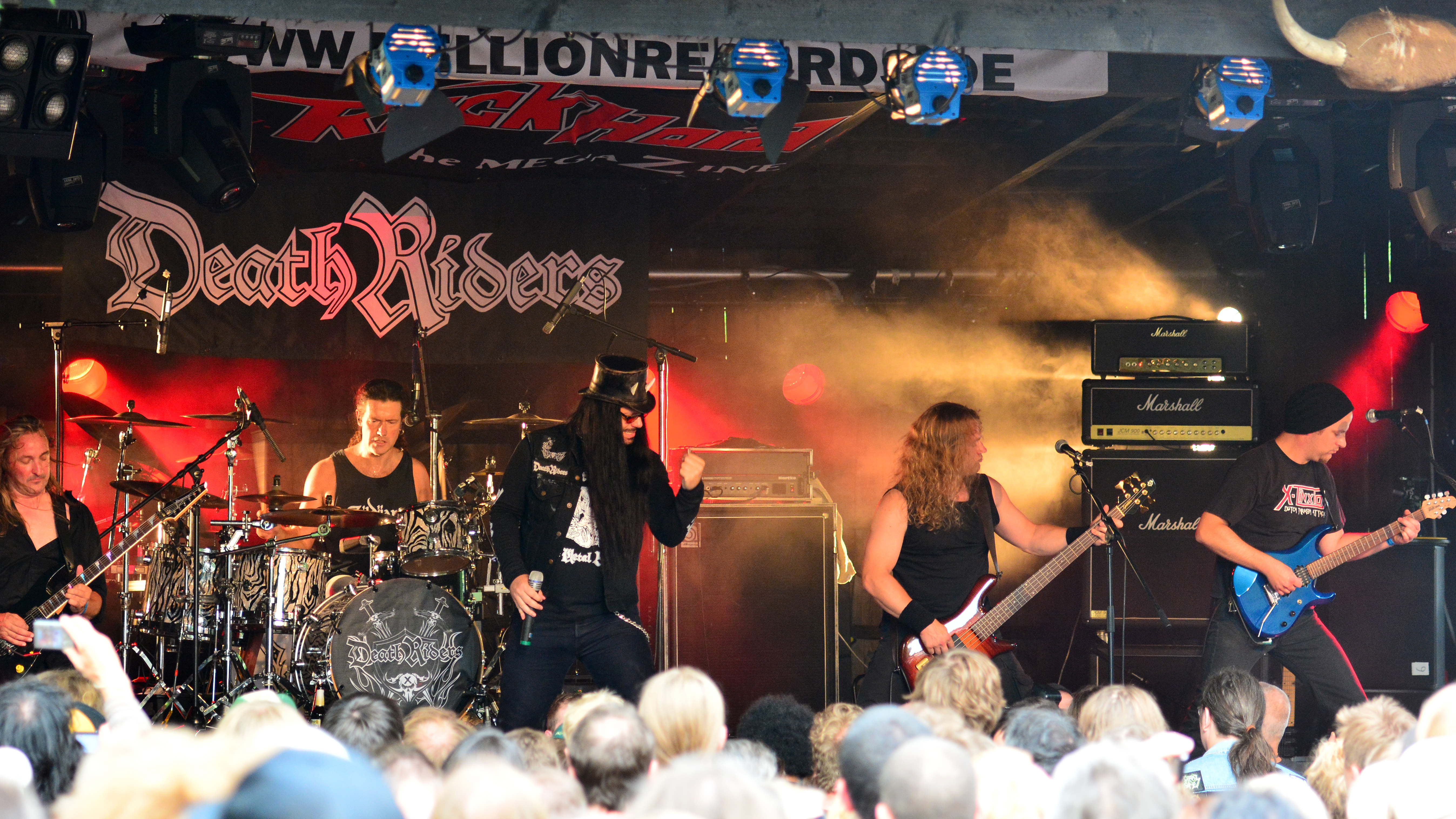 Deathriders beim Headbangers Open Air 2014